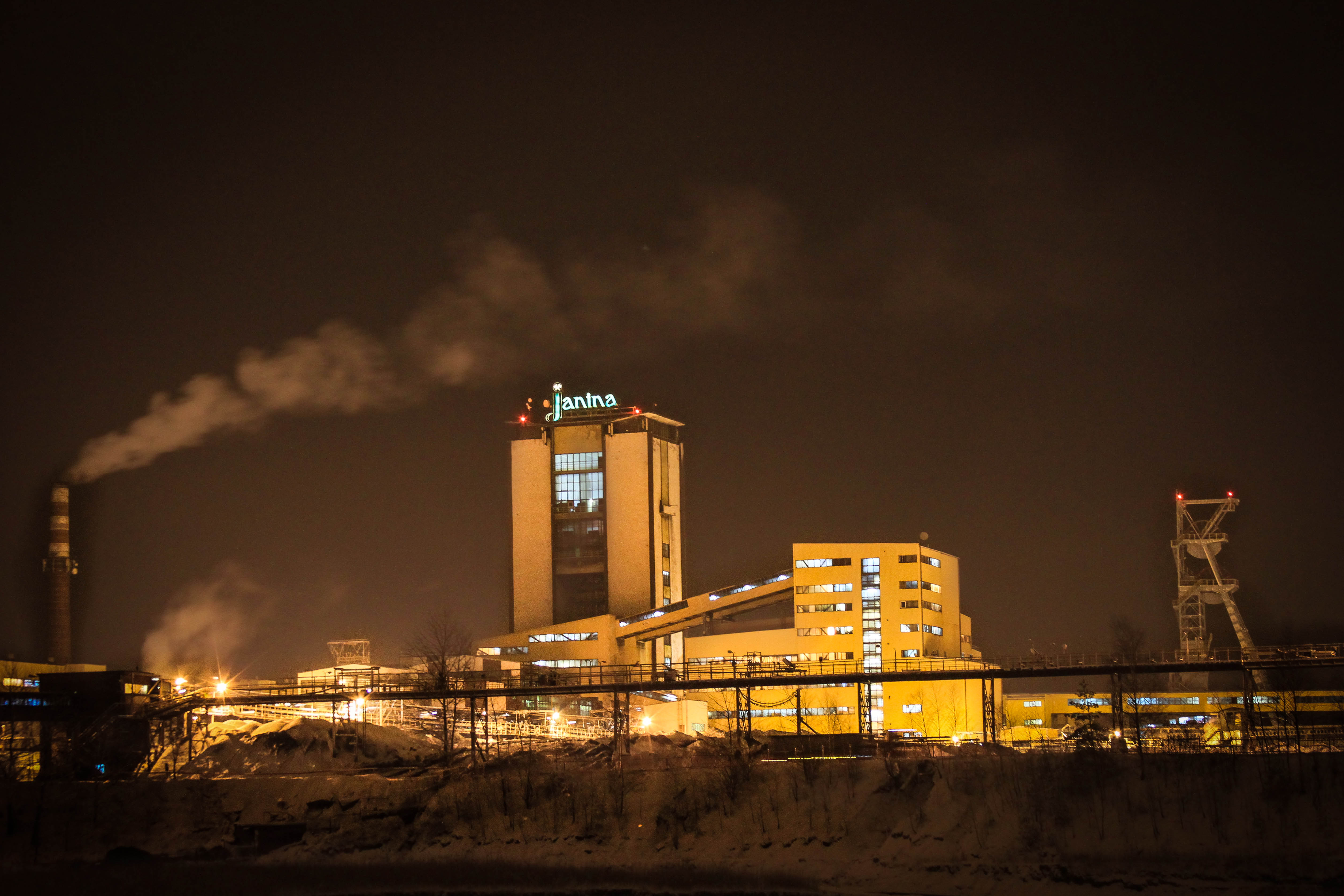 Kopalnia Janina w Libiążu nocą